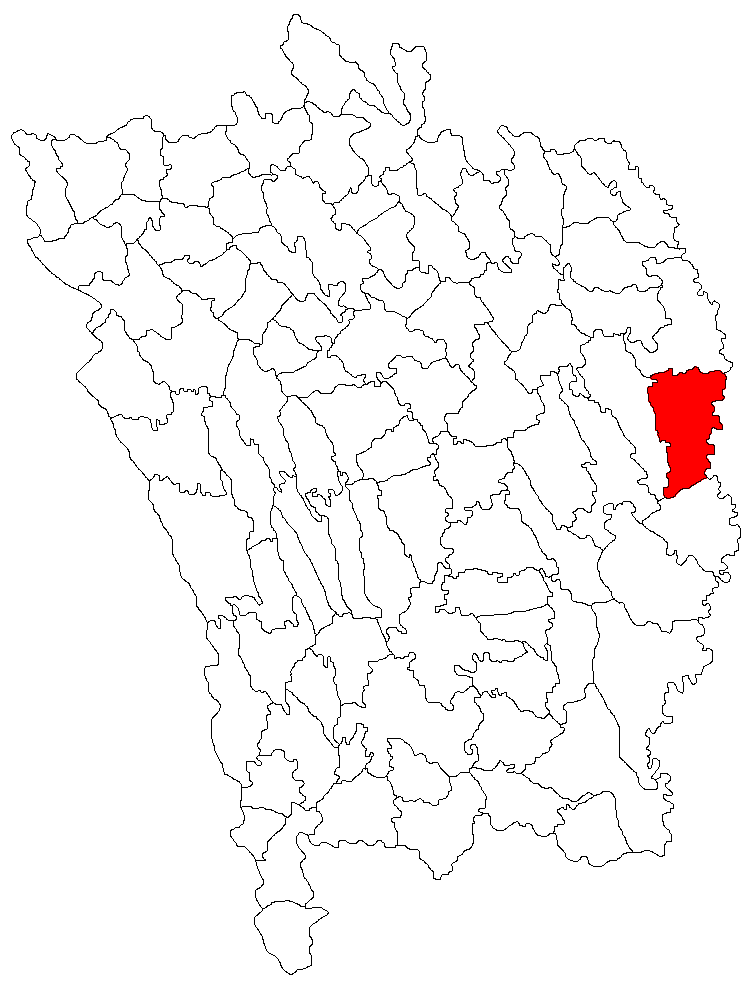 Categorie:Hărţi ale judeţului Vaslui